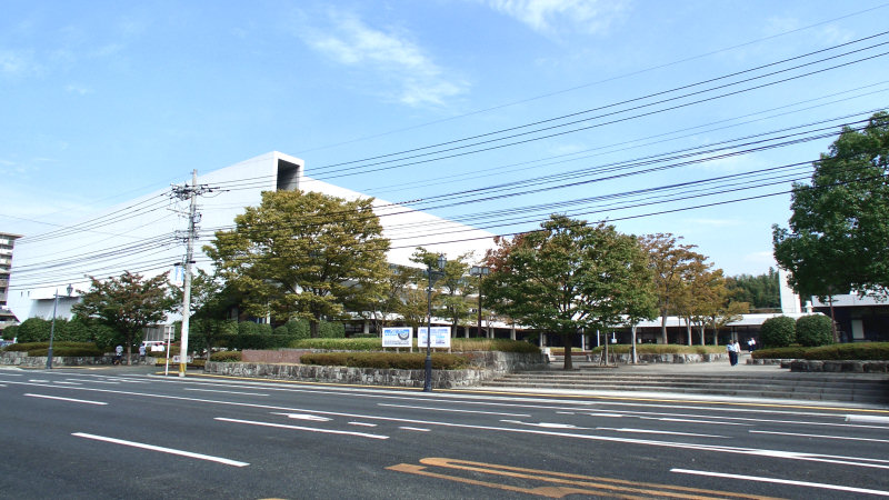 Gimnasio Prefectural de Kukamoto. Kukamoto, Japón